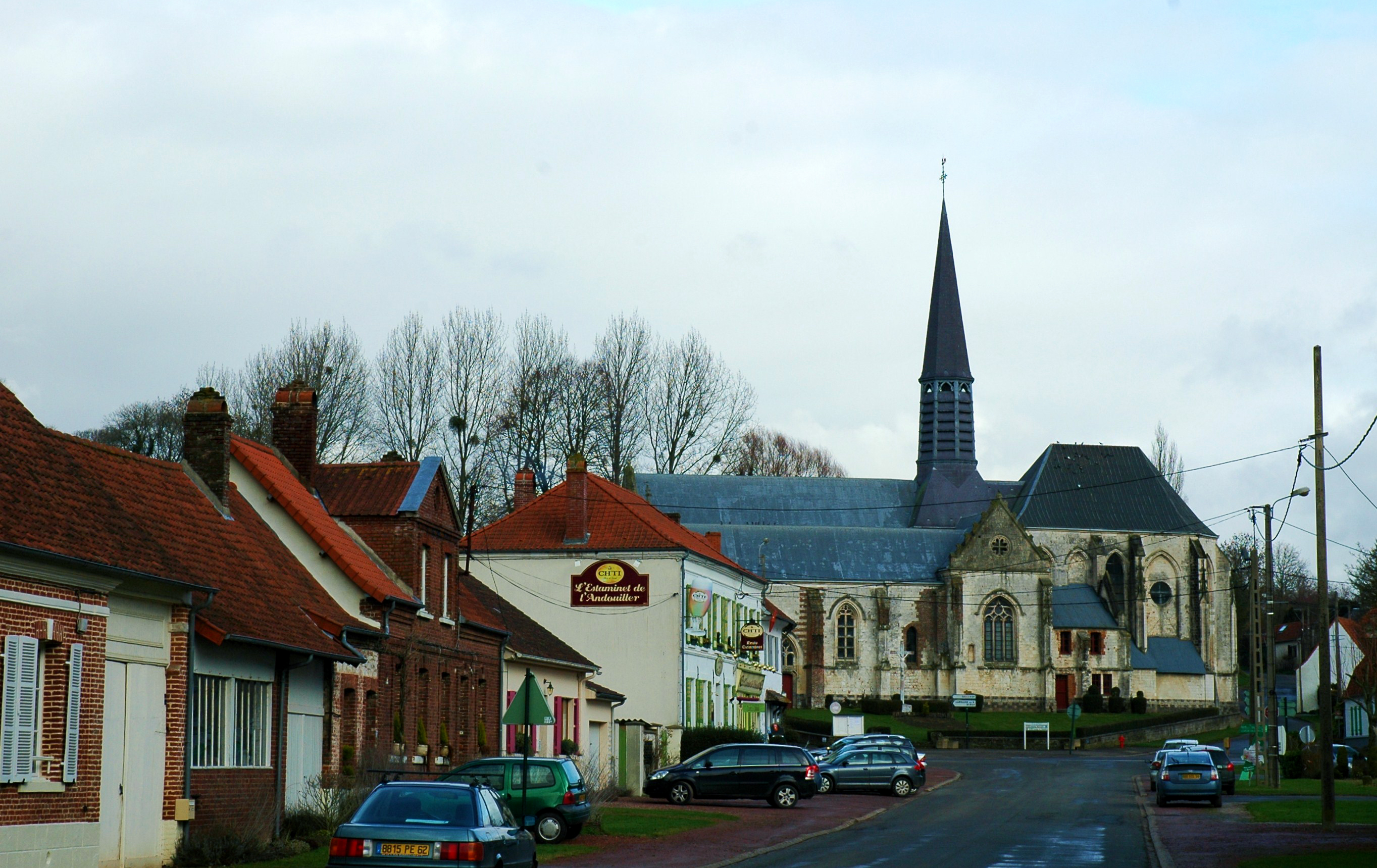 Douriez (Pas-de-Calais, France). Le centre du village.